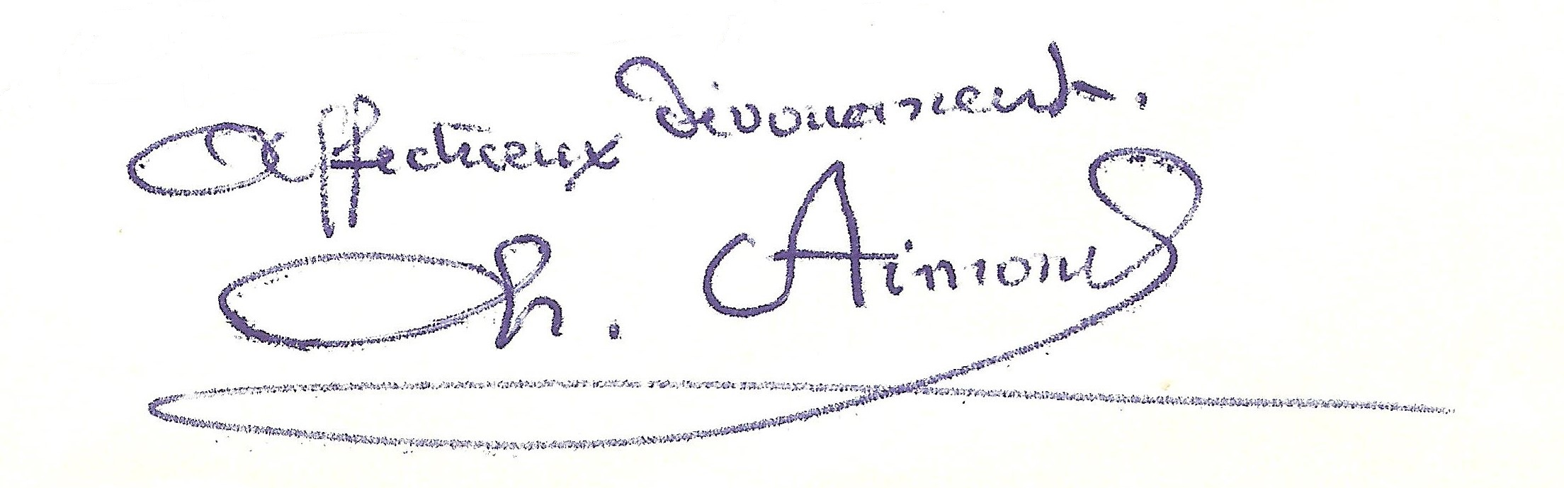 Autographe de Monseigneur Charles Aimond (1874–1968). Cet autographe est à la fin d’une lettre adressée à Jean Grosdidier de Matons (1960), filleul de Monseigneur Charles Aimond. Source : Archives Jean Grosdidier de Matons (1926–2017).